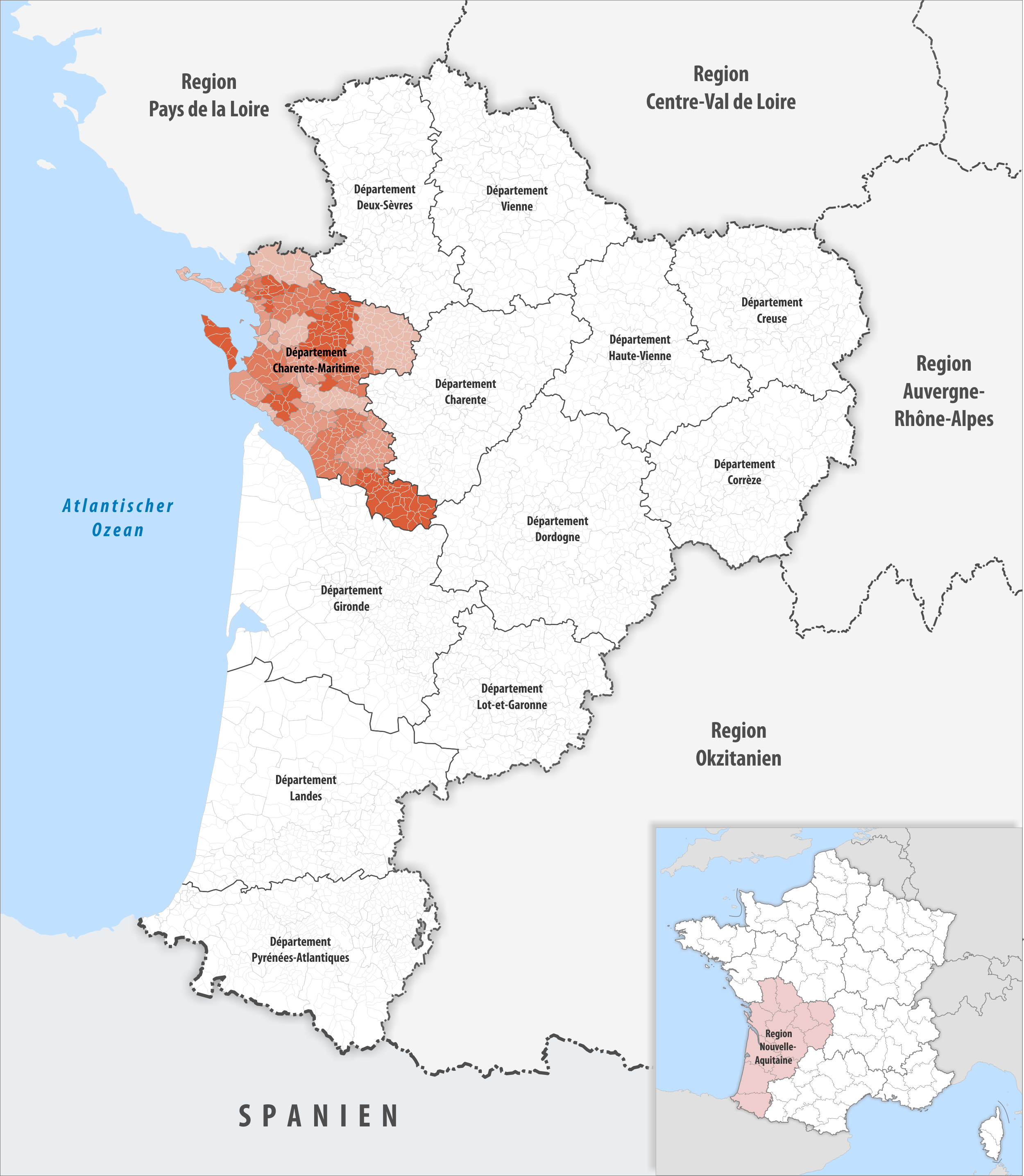 Lage des Departements Charente-Maritime